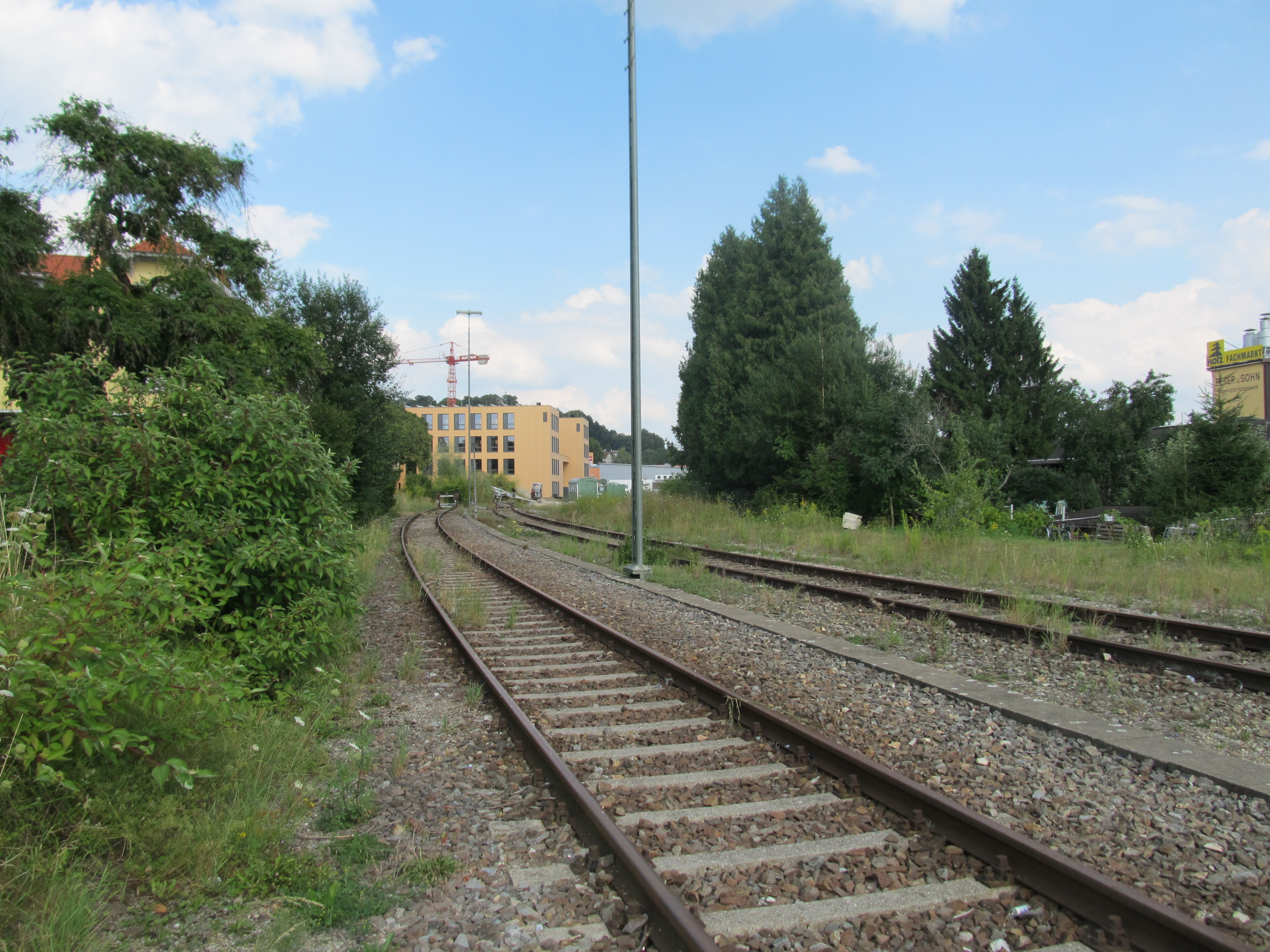 ehemalige Gleisanlagen der Bahnstrecke von Leutkirch nach Isny im Bahnhof Leutkirch